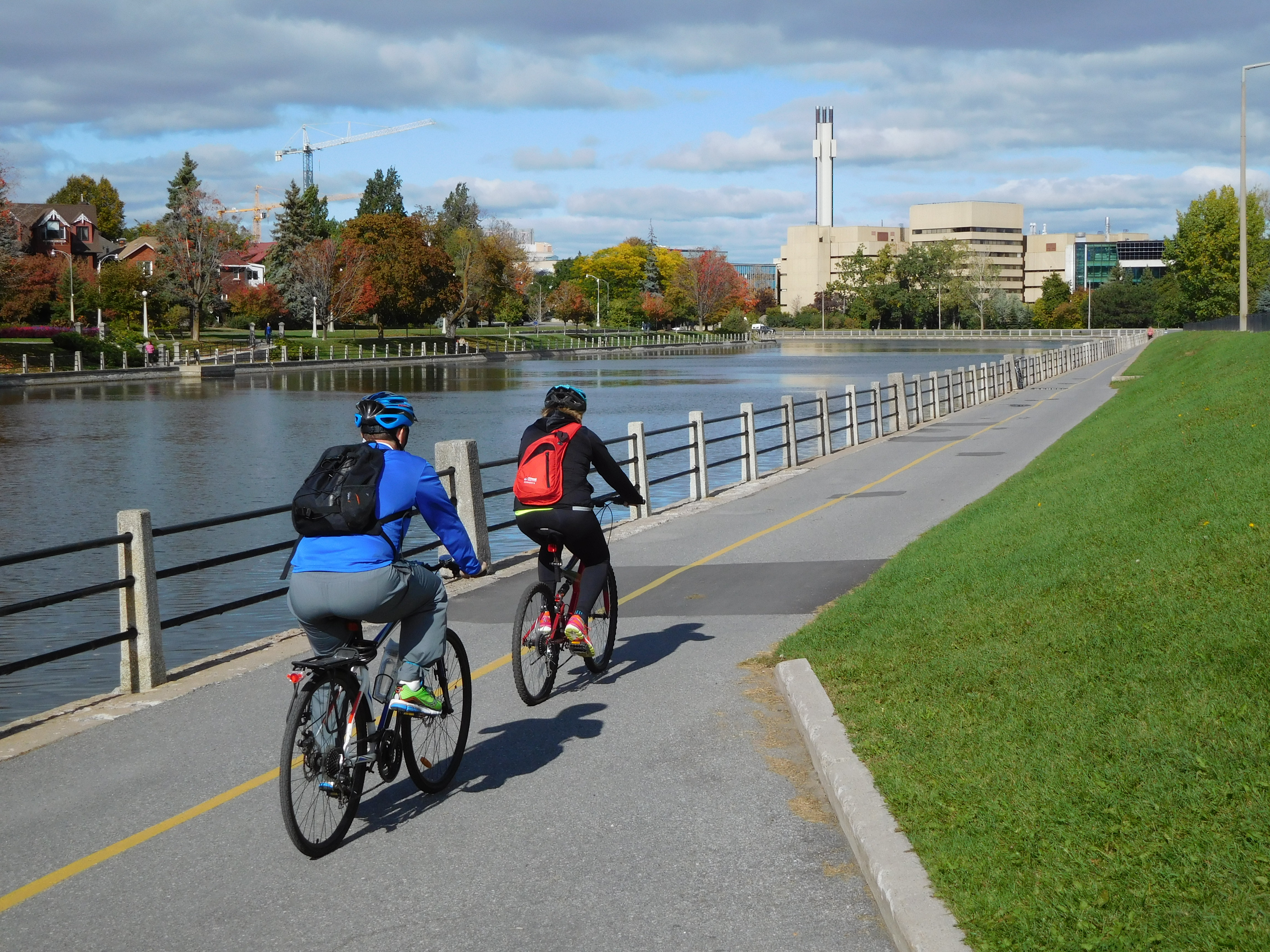 Le canal Rideau près de la rue Main